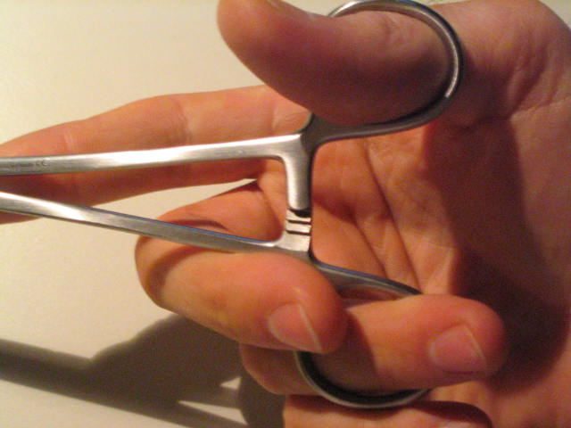 Das Bild zeigt einen Nadelhalter nach Heger in meiner Hand.